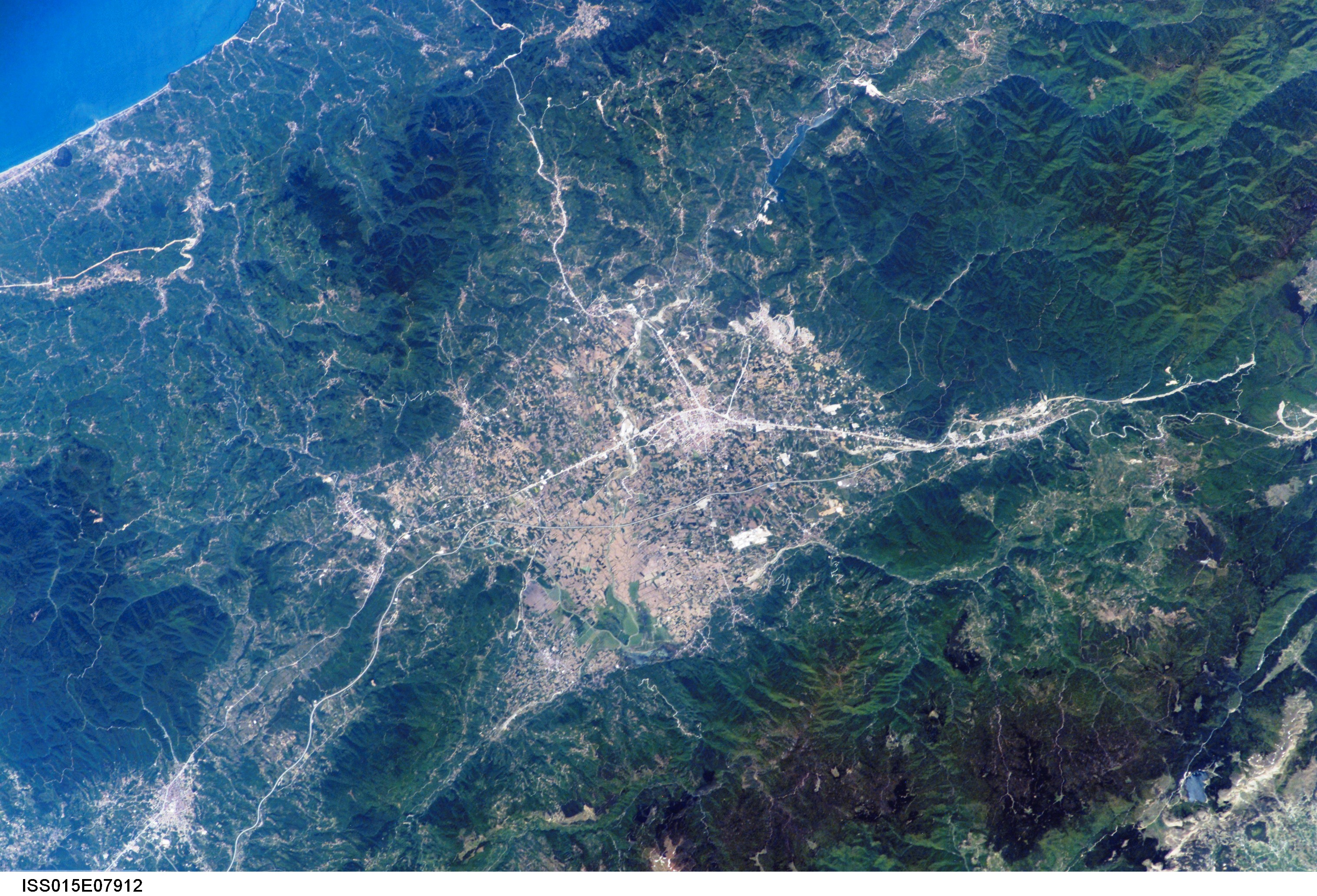 Düzce şehri ve yakın çevresi.